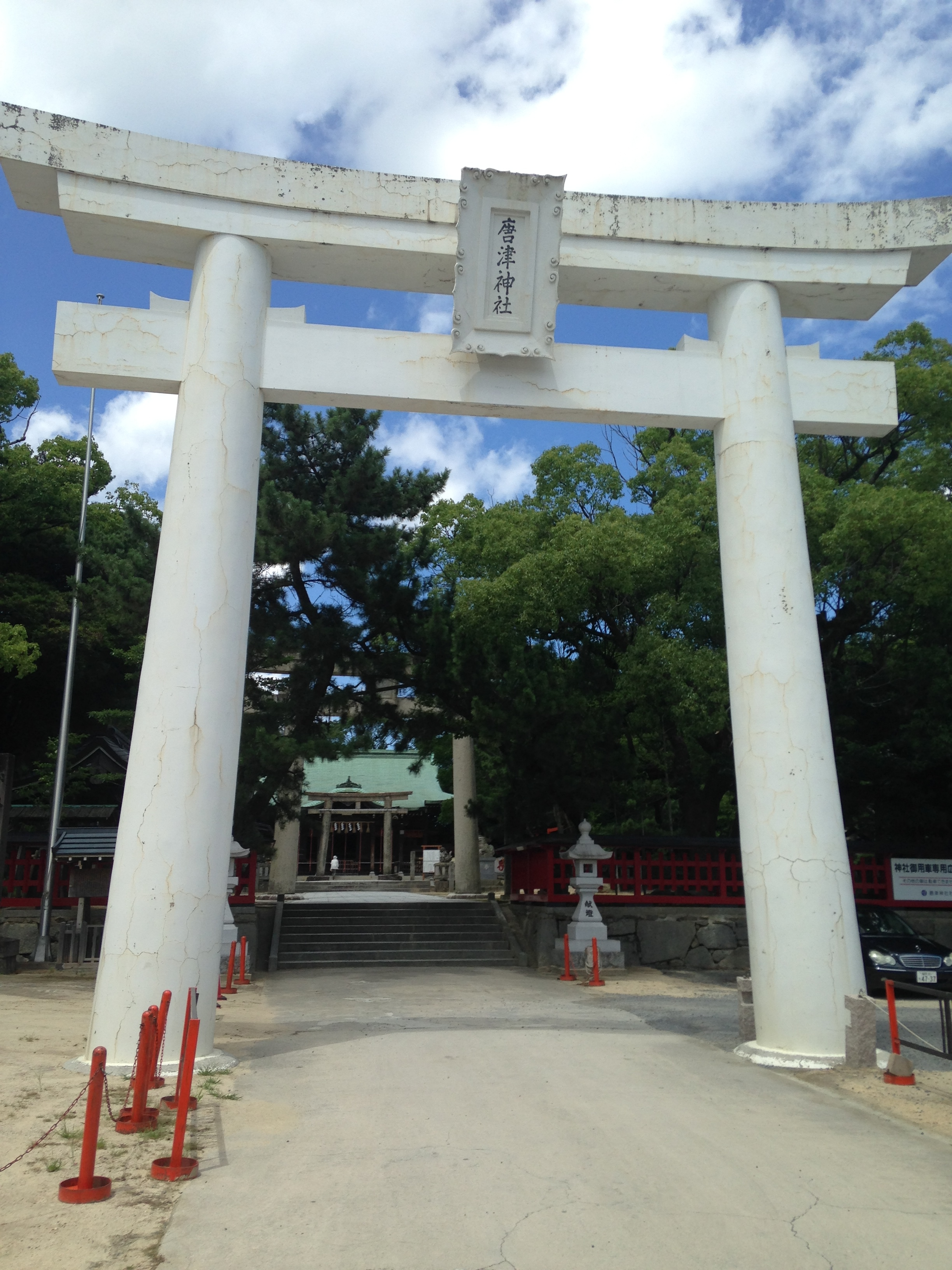 唐津神社・表鳥居